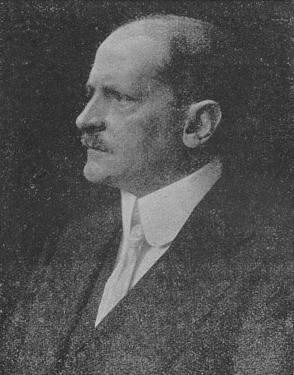 Professor Hermann Emil Pohle, der bekannte Maler und erster Vorsitzende des Vereins zur Veranstaltung von Kunstausstellungen, begeht am 12. Dezember seinen 50. Geburtstag (1913)